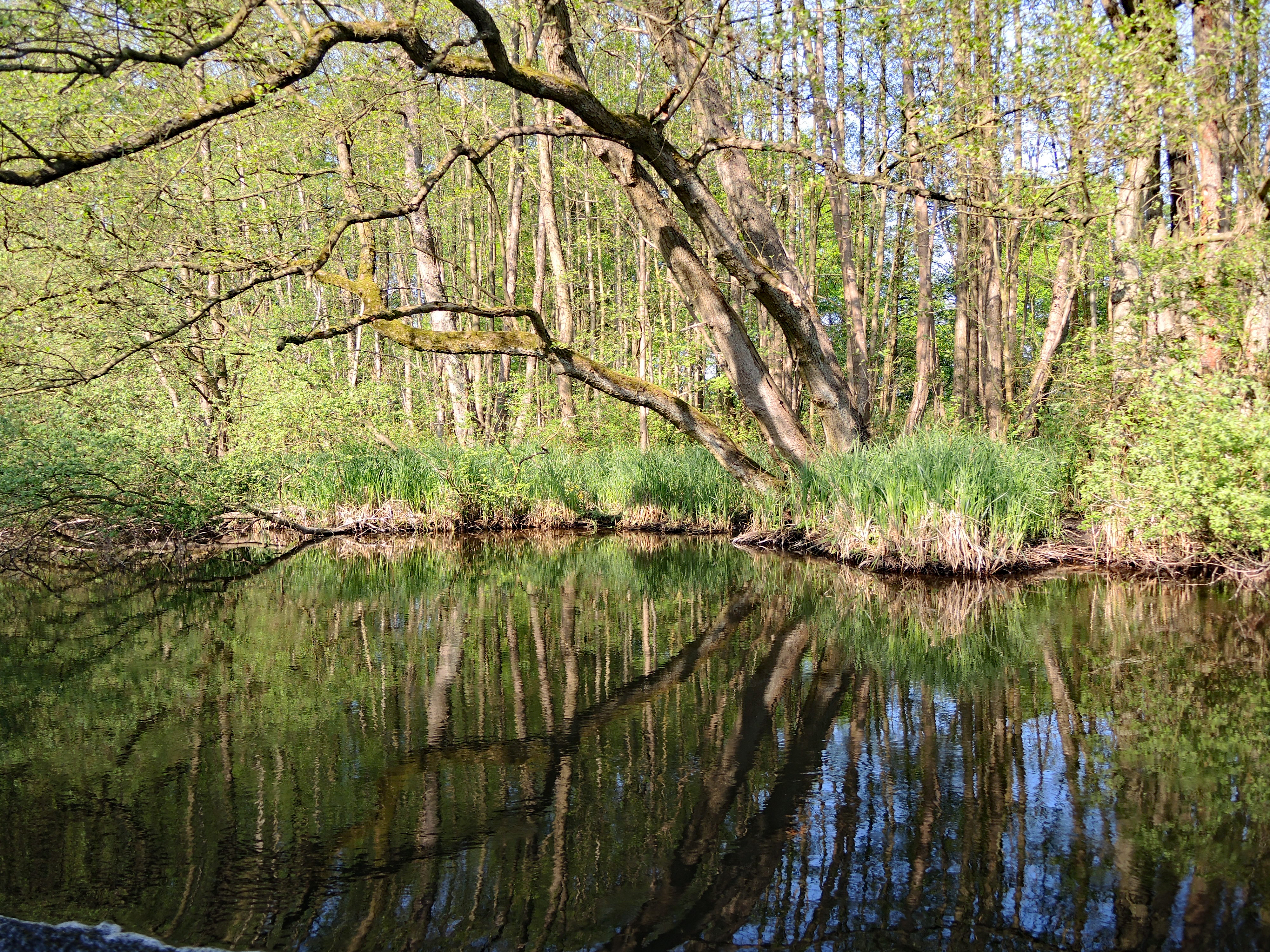 Wasserspiegelung am Ufer